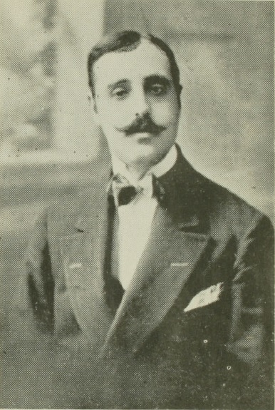 Fotografia de Francisco Javier Ovalle Castillo en el libro "Don Pedro Montt : ex-presidente de la república de Chile" de 1918.